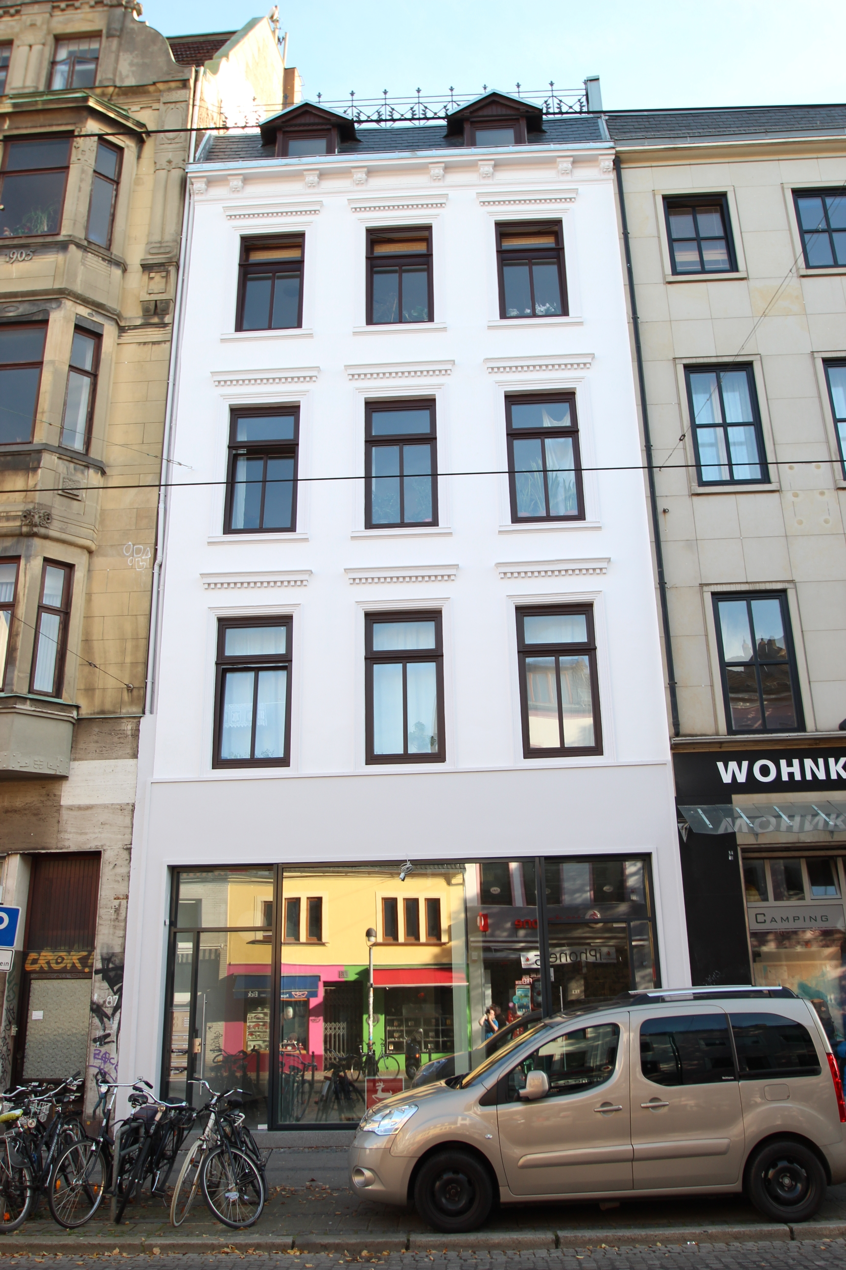 Wohnhaus in Bremen, Ostertorsteinweg 86Das abgebildete Objekt ist ein geschütztes Kulturdenkmal in der Freien Hansestadt Bremen, mit der Nr. 0976 beim Landesamt für Denkmalpflege registriert.